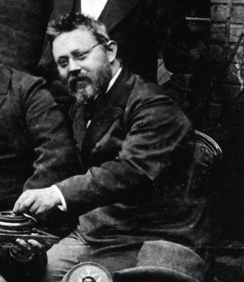 Bei der Aufnahme handelt es sich um einen Ausschnitt aus einem Gruppenbild, das anlässlich des 80. Geburtstags von Conrad Wilhelm Hase im Dezember 1898 aufgenommen wurde und den Architekten und Kirchenbaumeister Friedrich Wilhelm Karl Jacob zeigt. Jacob war ein Schüler und später auch enger Mitarbeiter von Hase. Quelle: Stadtarchiv Hannover, 3 NL 158, Nr. 2999